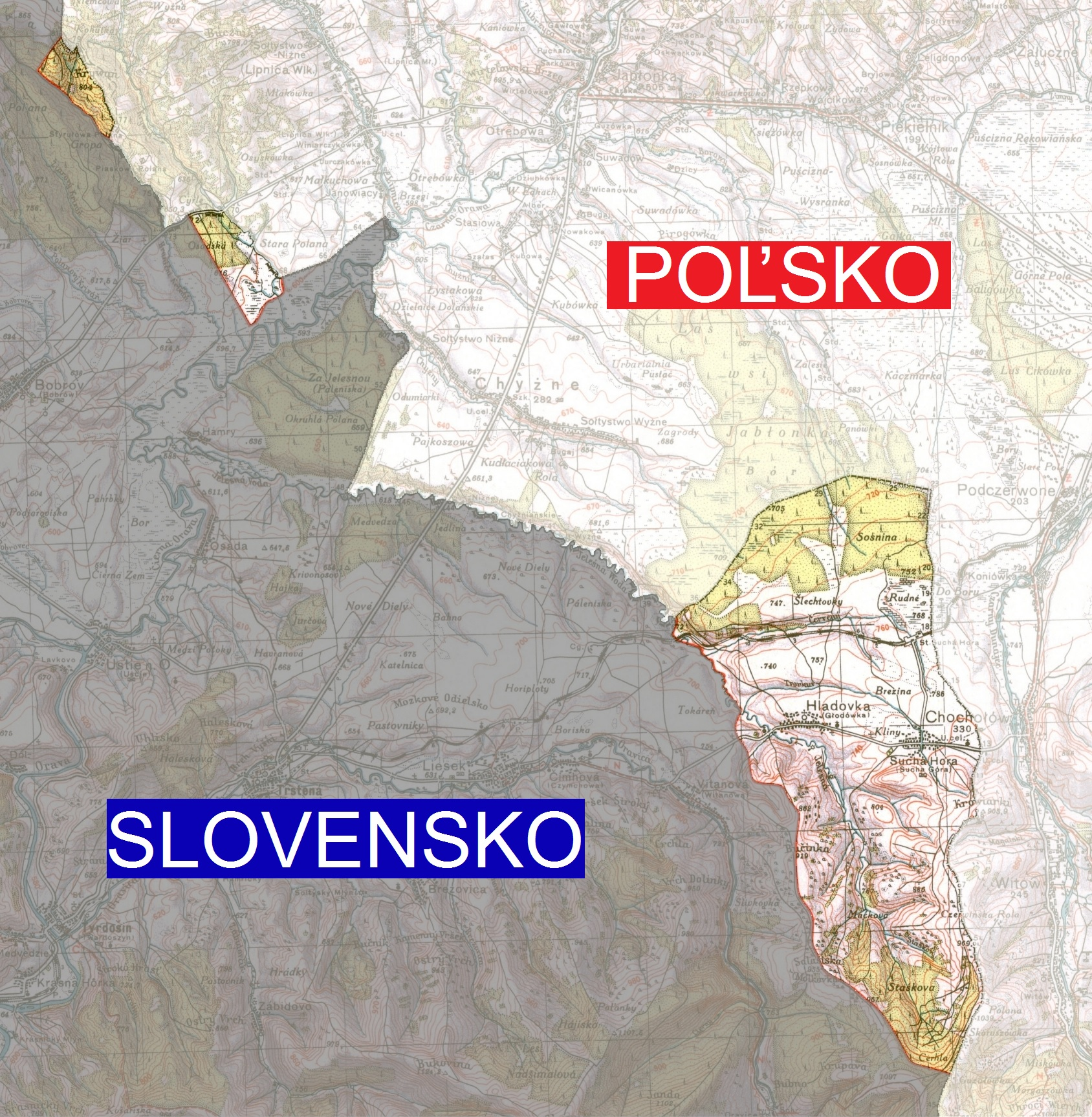 Odobraté slovenské územia na Orave